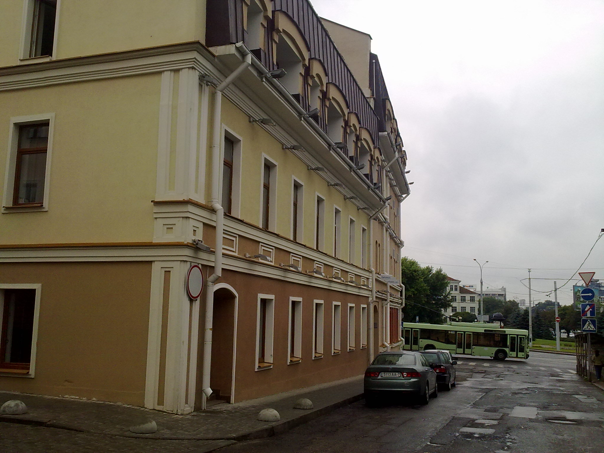 Мінск. вуліца Рэвалюцыйная. 2012